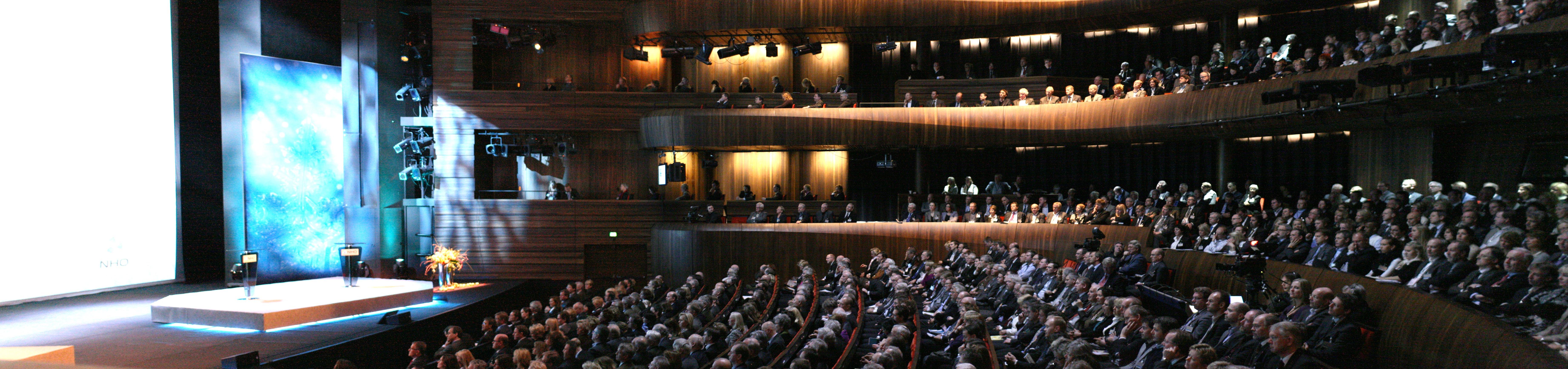 Panorama fra Operahuset i Oslo. Fra NHOs Årskonferanse 2009.